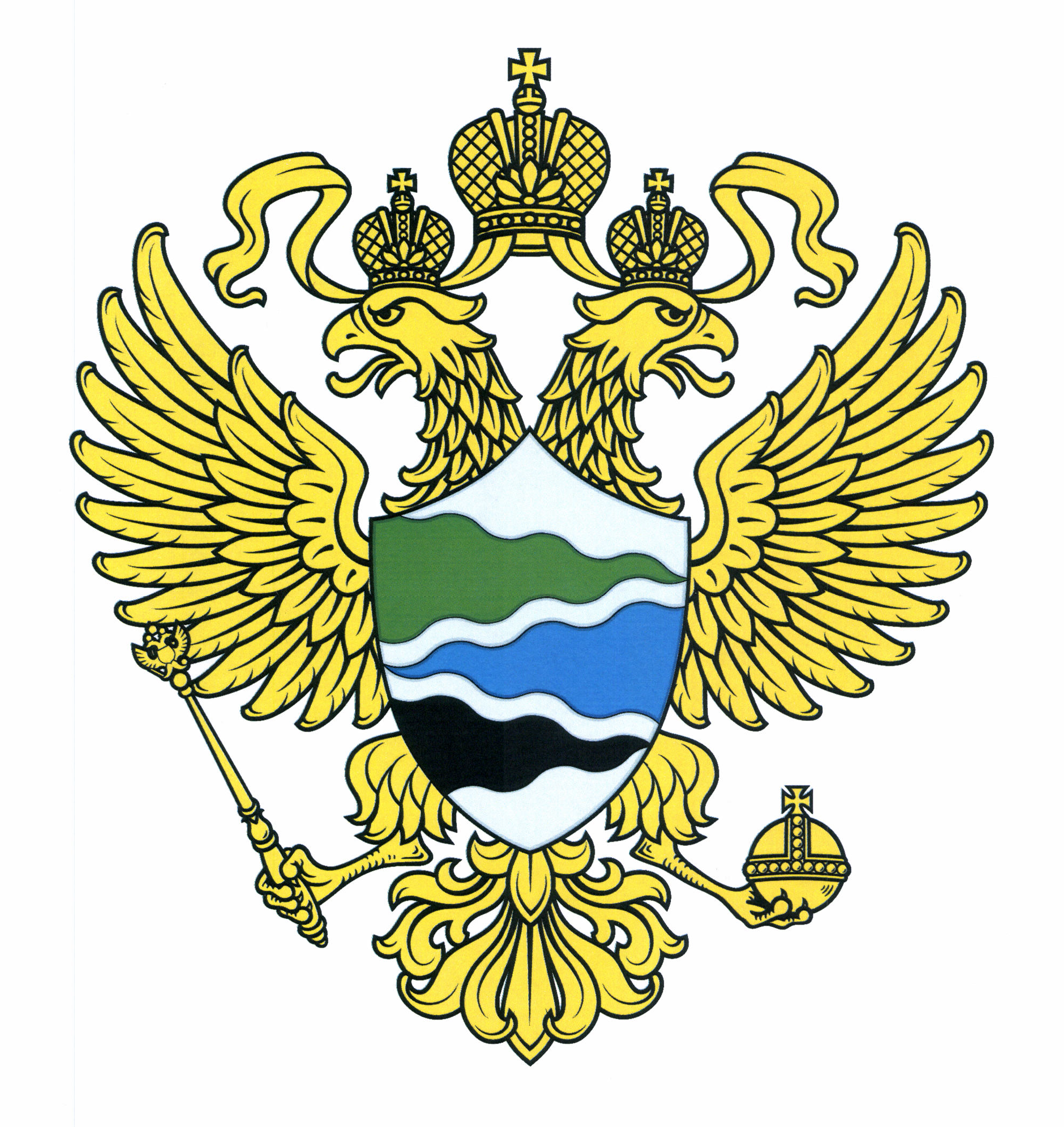 Министерство природных ресурсов и экологии Российской Федерации (Минприроды России)